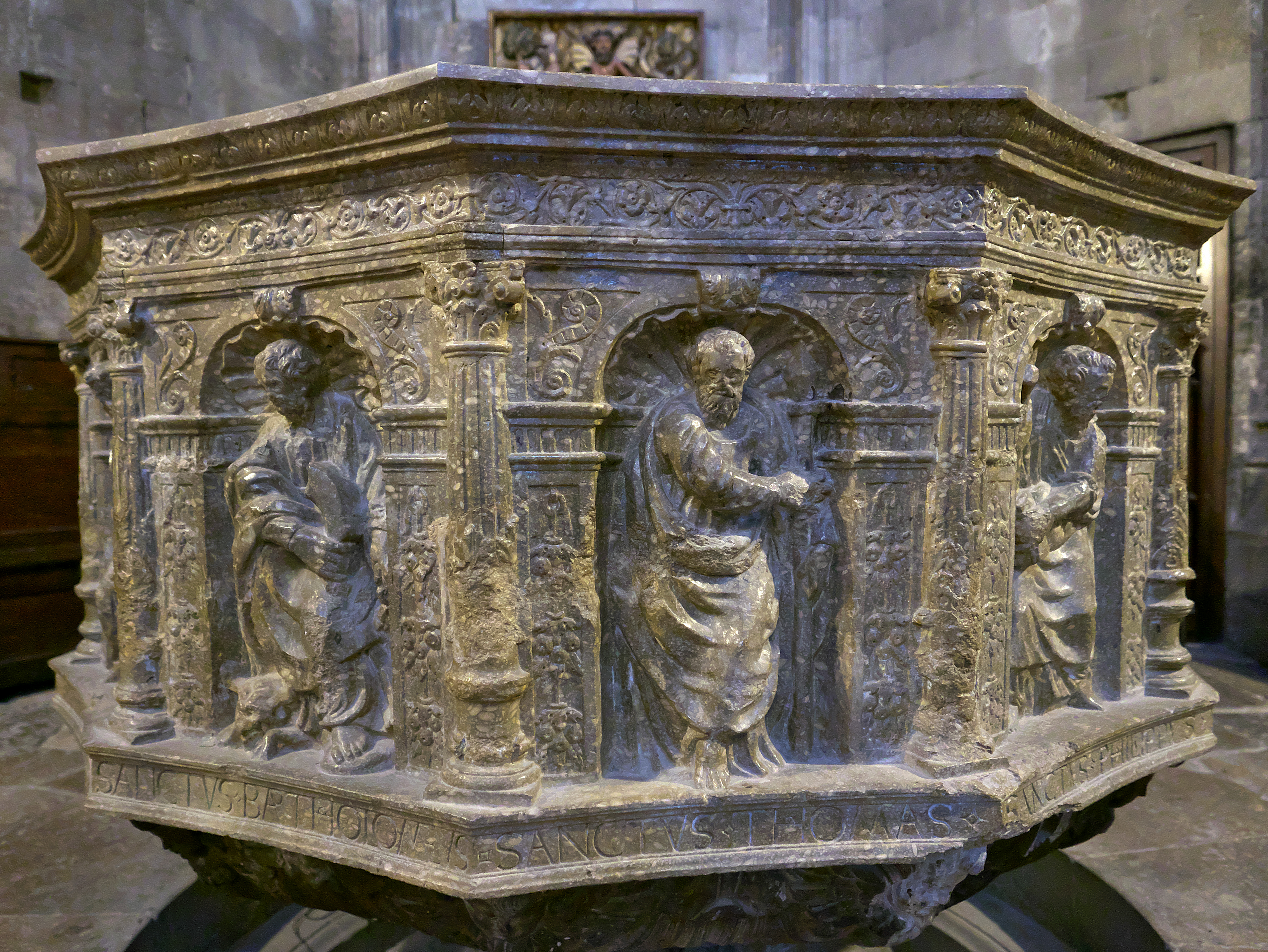 Obra de Guido Bonjoc (1528)